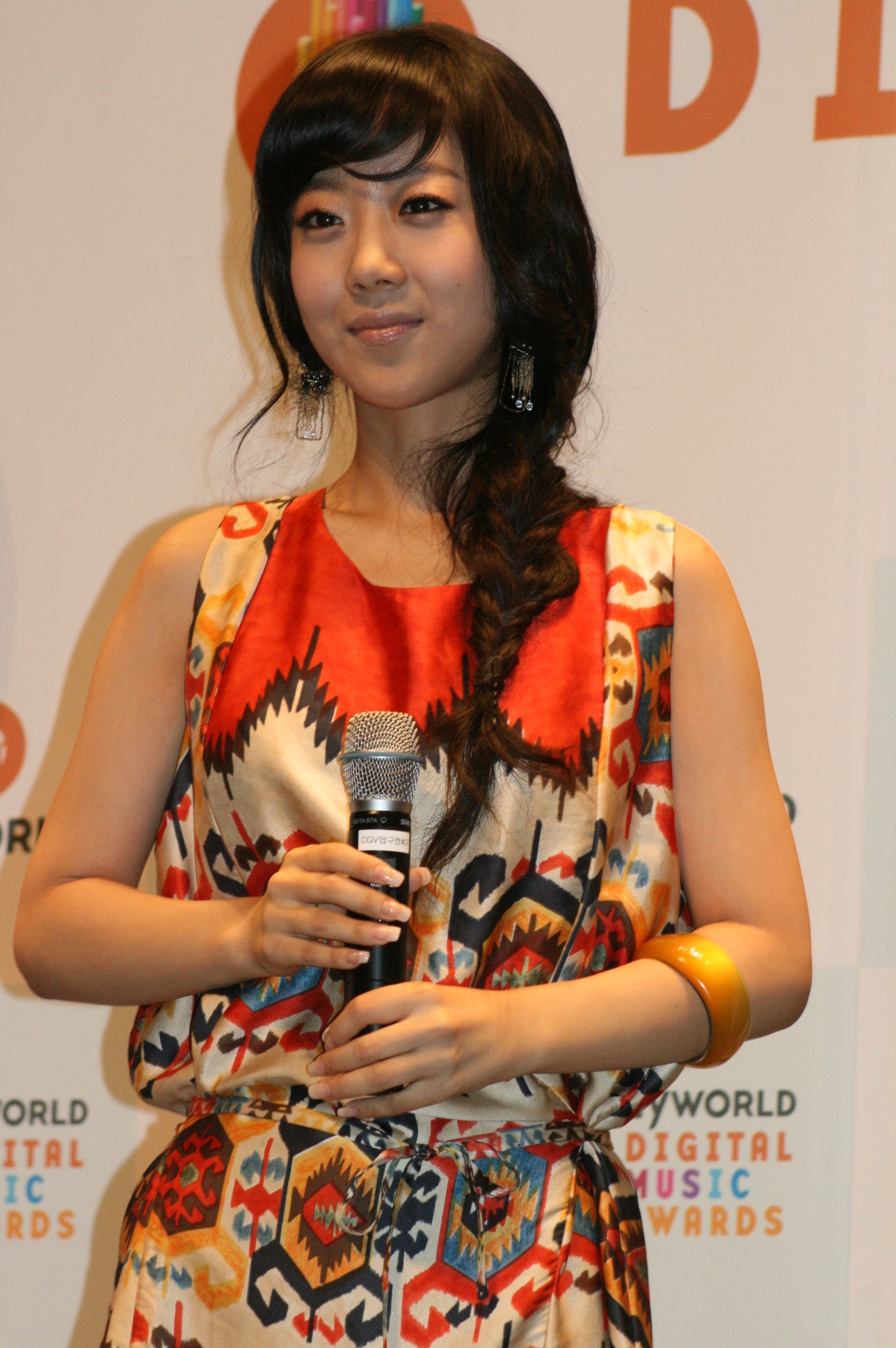 사진 196